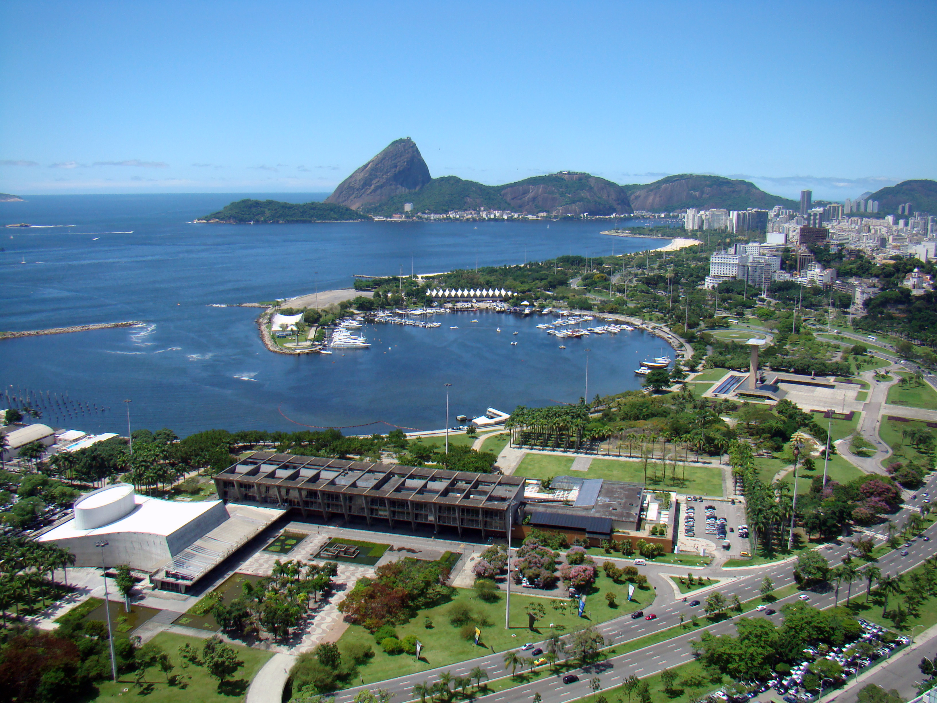 Foto tirada do Edif�cio Santos Dumont No Centro do Rio.